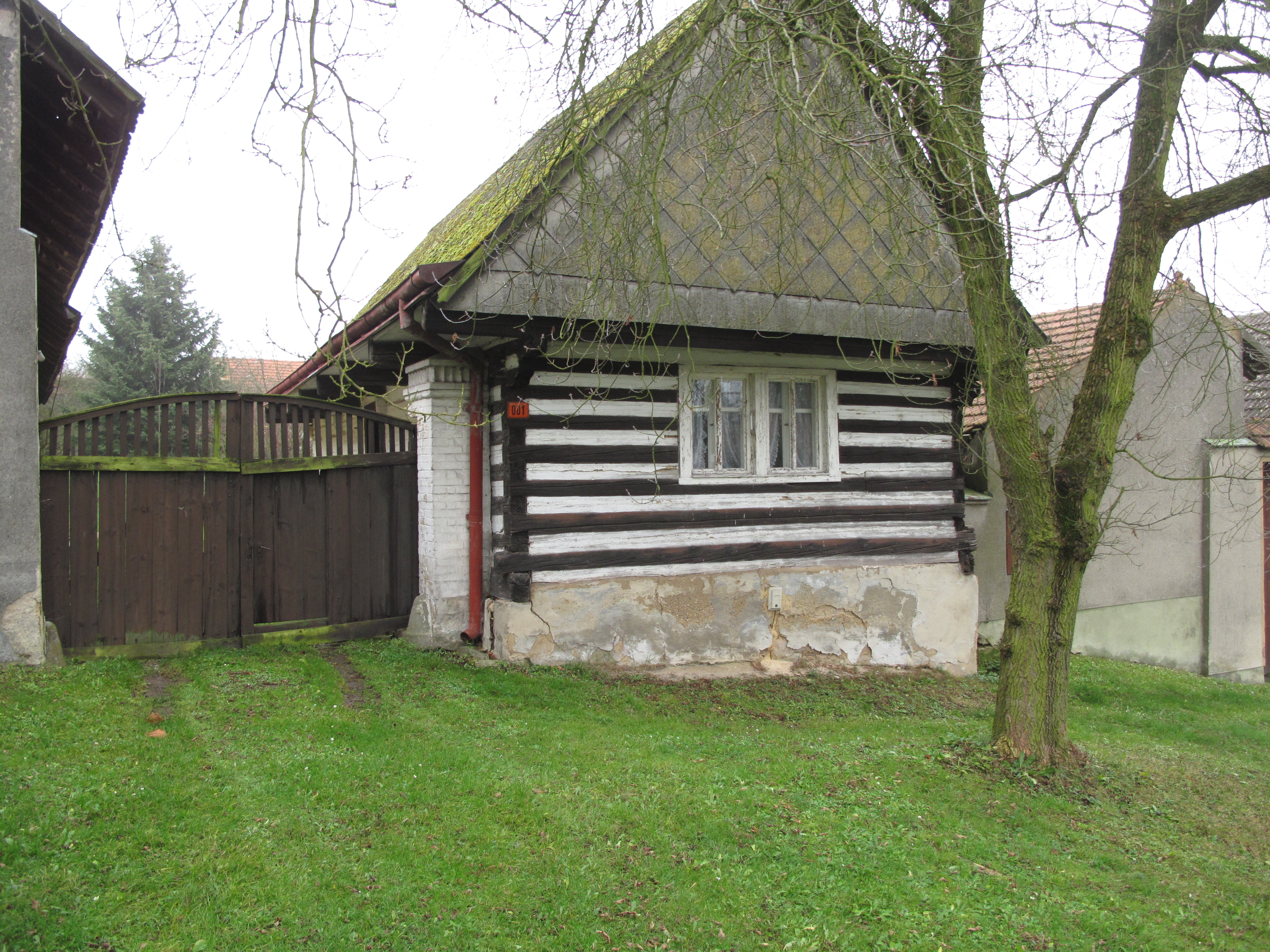 Roubenka ve Hvozdu. Okres Rakovník, Česká republika.